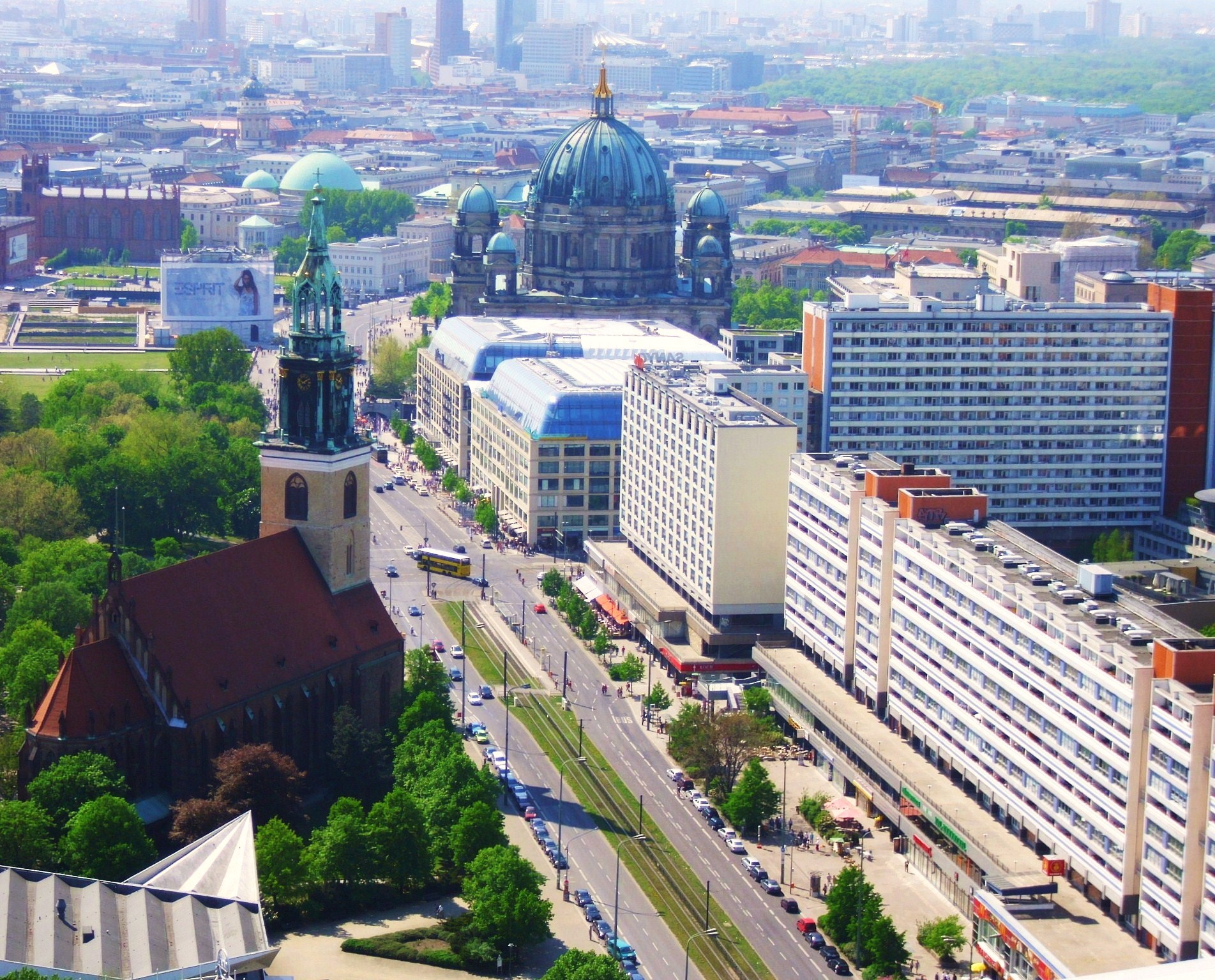 Blick vom Park Inn-Hotel auf die Karl-Liebknecht-Straße in Richtung Unter den Linden